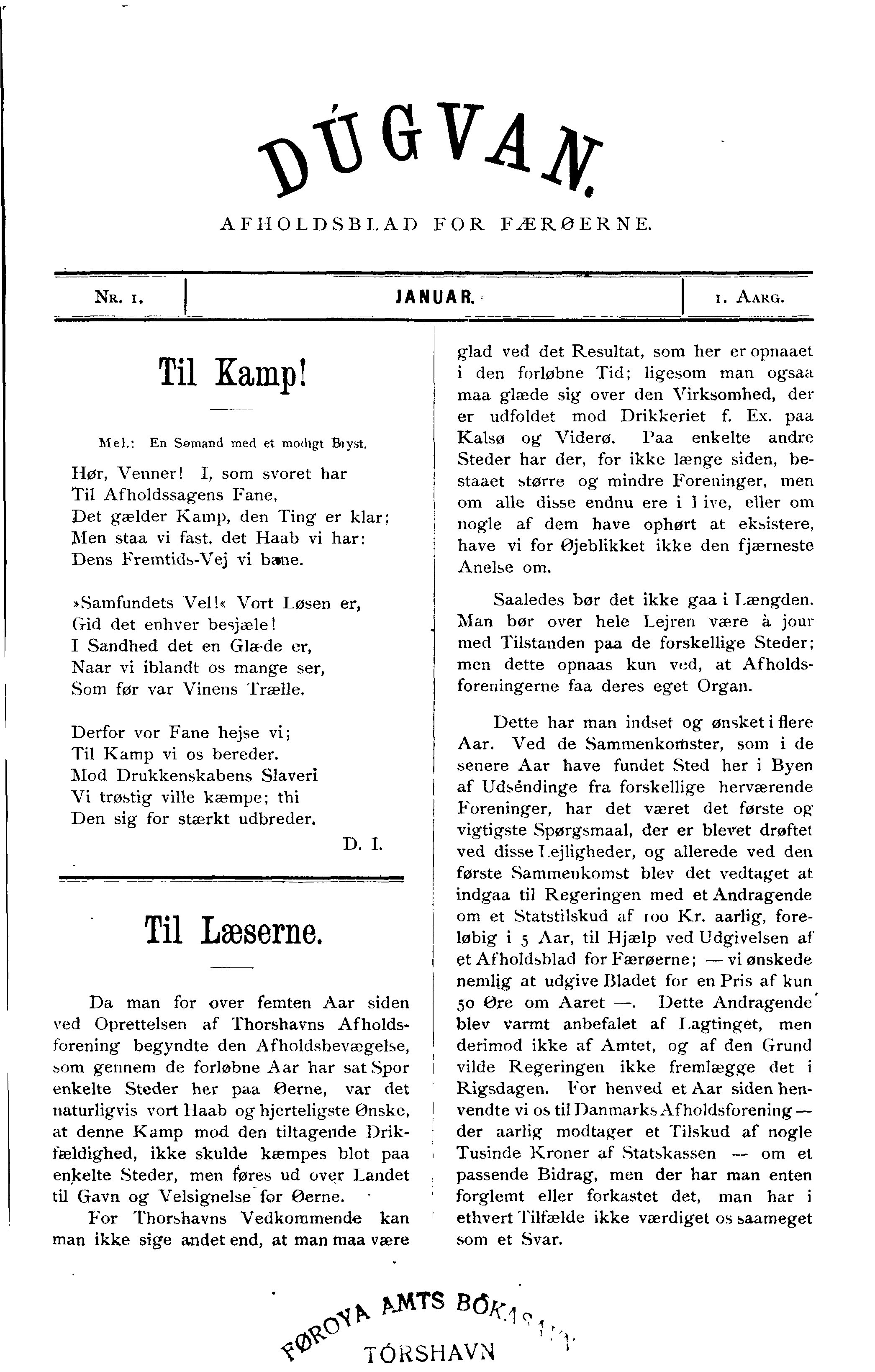 Føroyskt: Dúgvan Nr. 1.